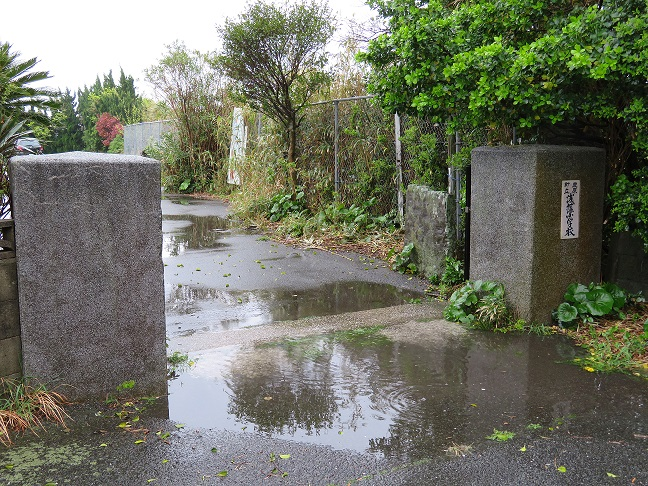 厳原町立浅藻小学校跡